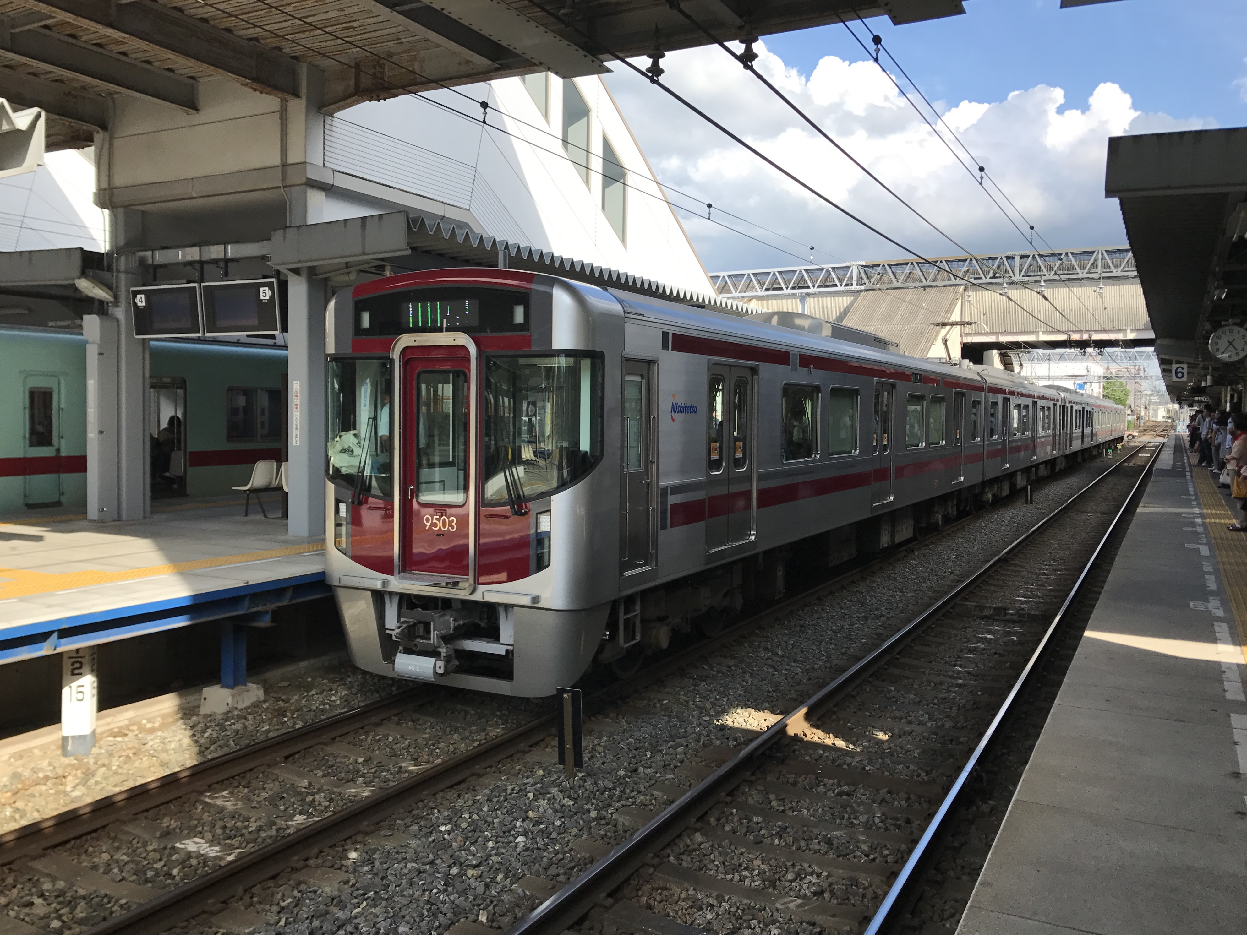 西鉄二日市駅にて停車中の西鉄小郡行き急行列車